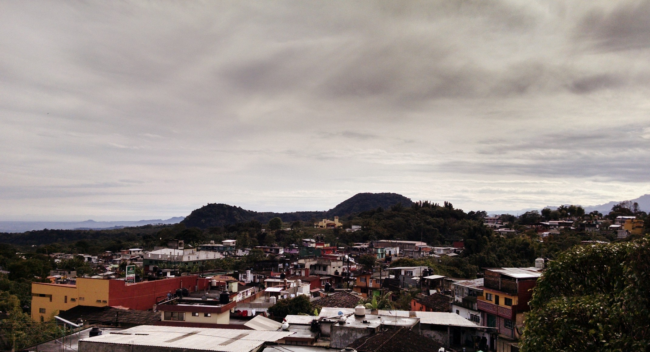 Dos Cerros Hueytamalco